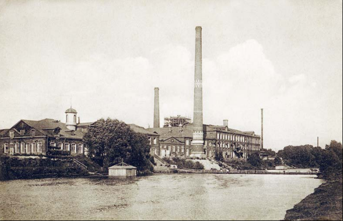 Подгорная мануфактура Зиминых. Конец XIX века